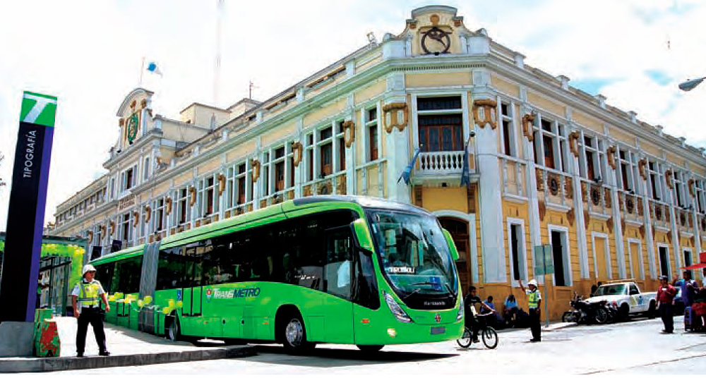 Estacion tipografia